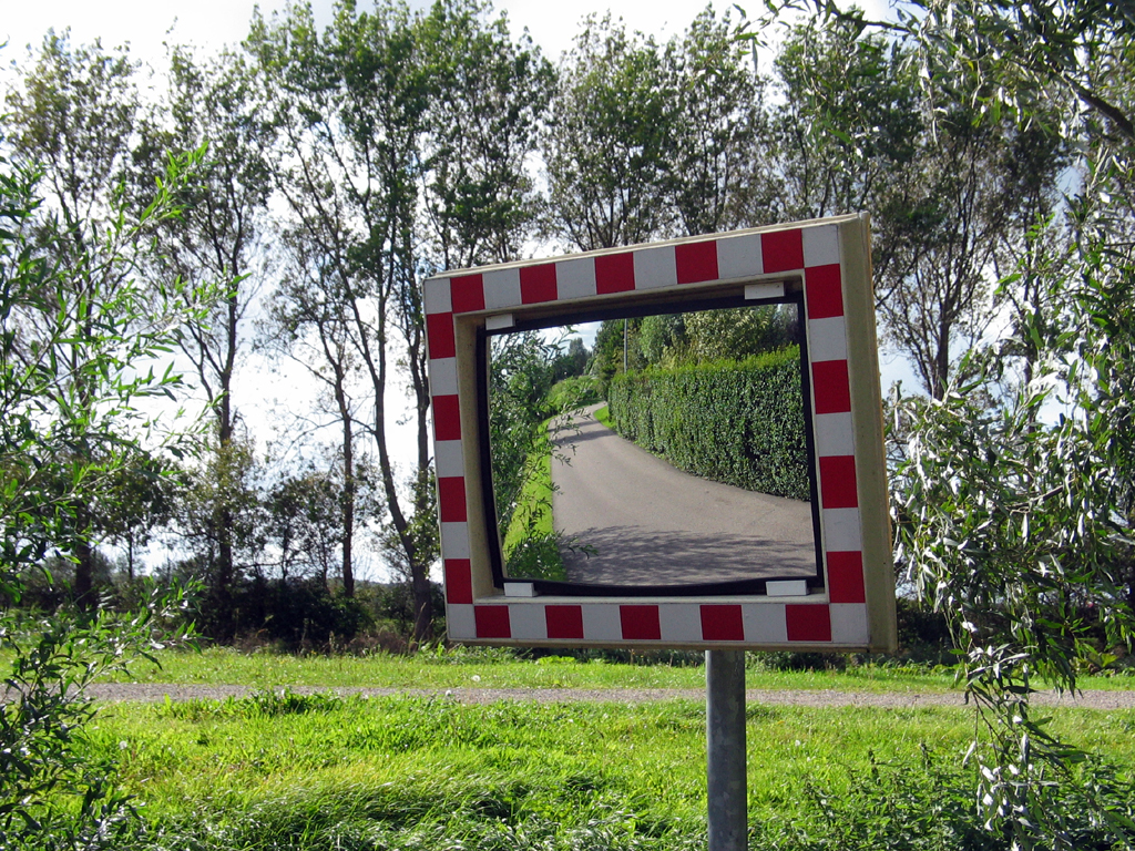 Spiegel (Mirror)